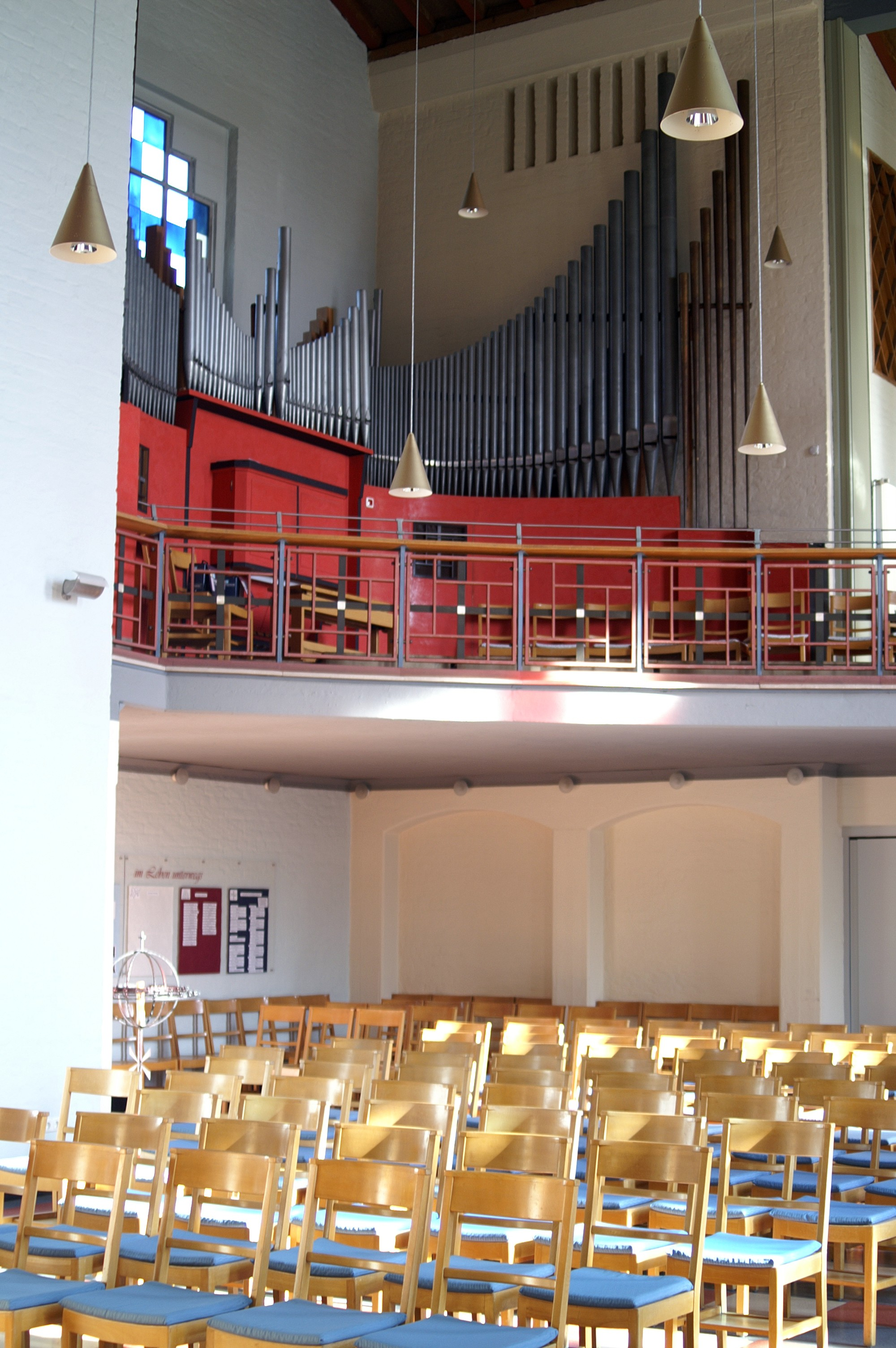 St. Matthäus Regensburg innen